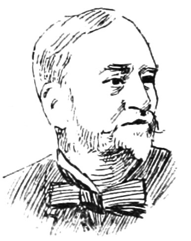 "La Nouvelle Chambre" : "Gérard".